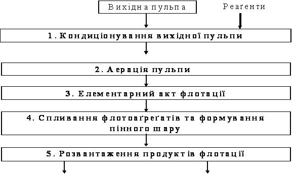 Феномент схема флотації